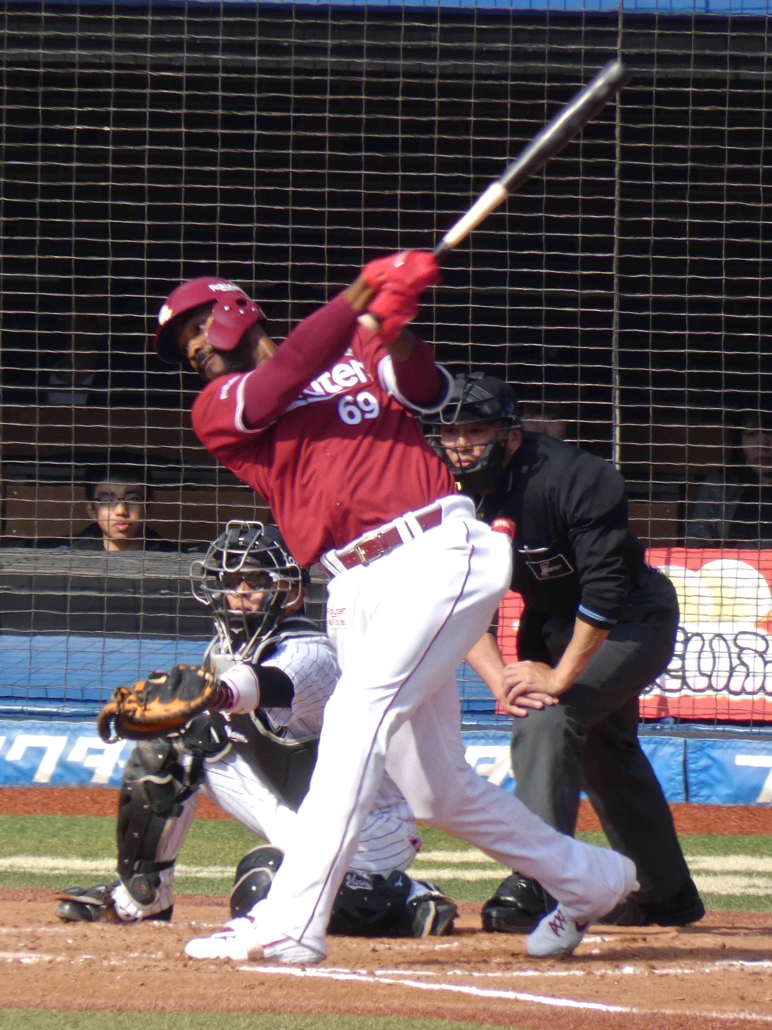 東北楽天ゴールデンイーグルスの選手「ジャバリ・ブラッシュ」。ZOZOマリンスタジアムにて。